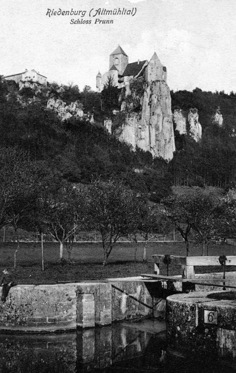 Burg Prunn, davor die Schleuse 6 des Ludwig-Donau-Main-Kanals